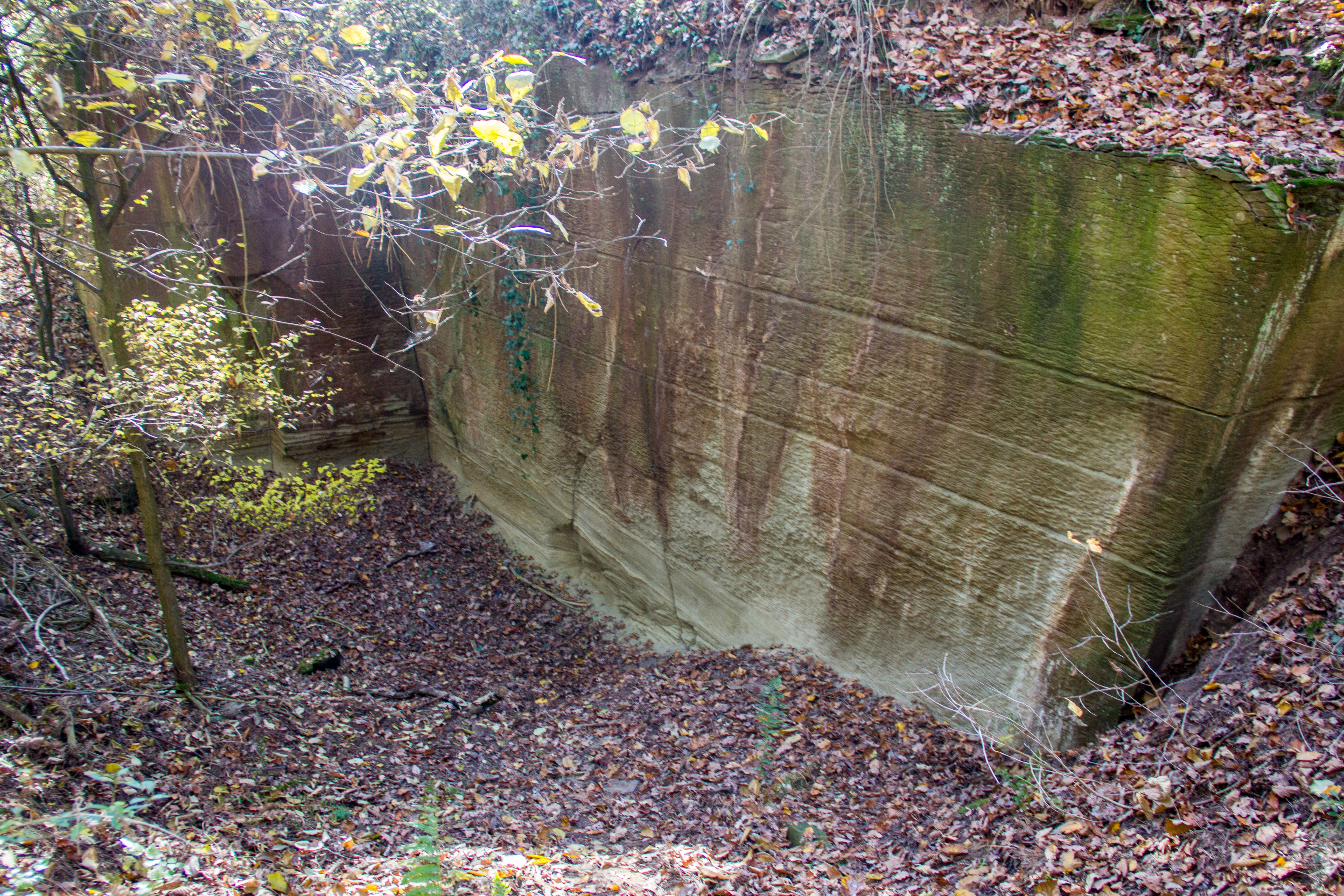 Frankfurter Brüche von Rödelsee, Geotop, Iphofen, Steinbruch